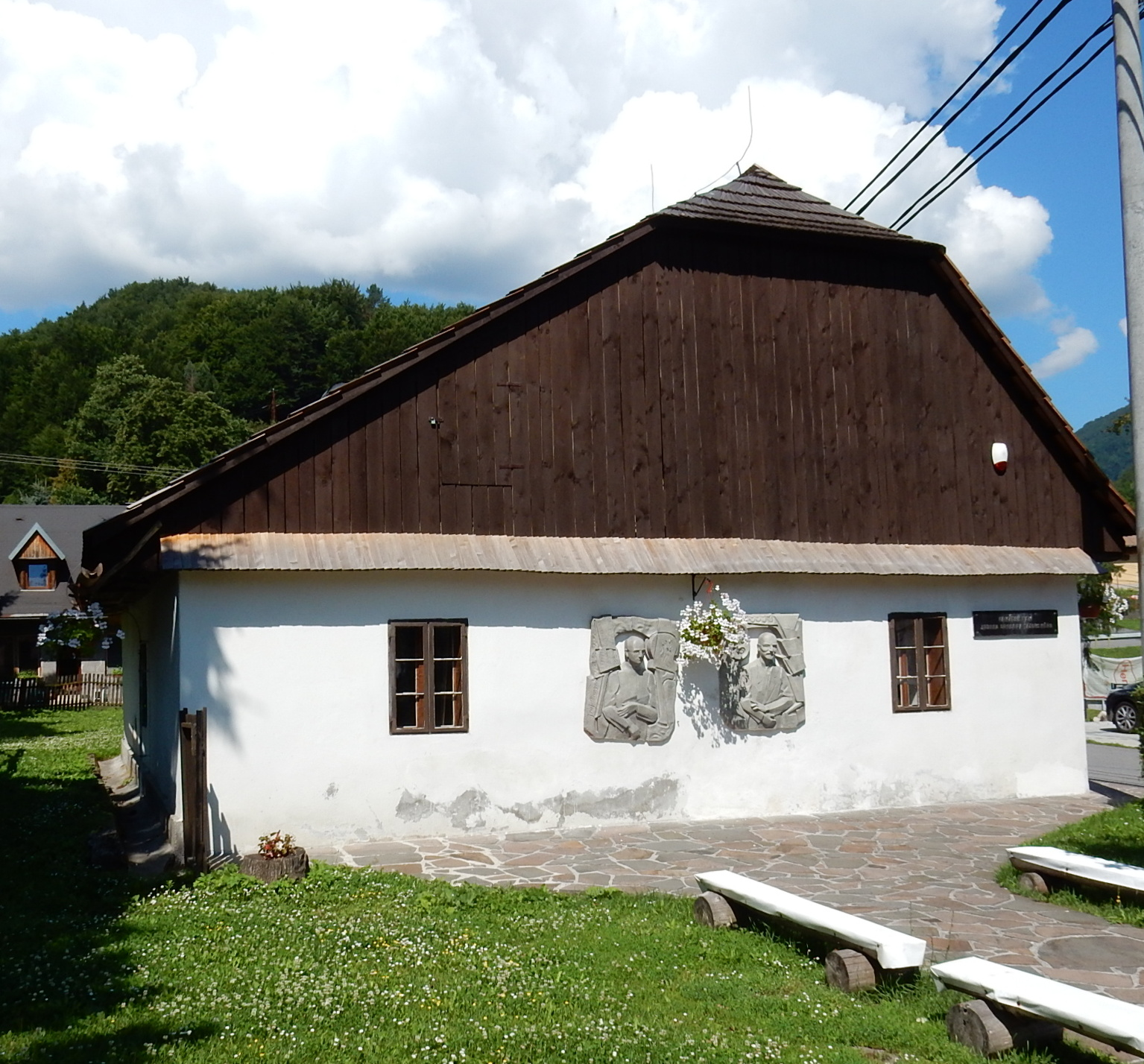 Dom pamätný